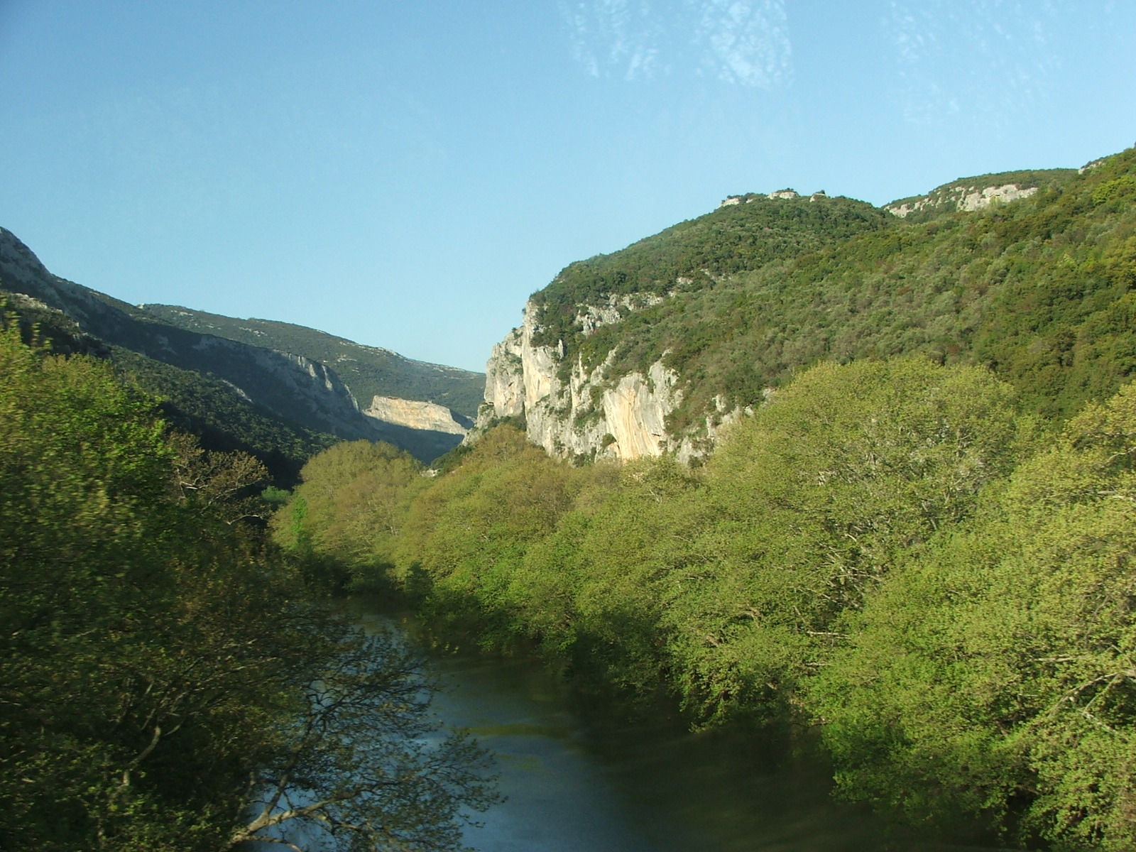 Dolina Tempi, Grecja